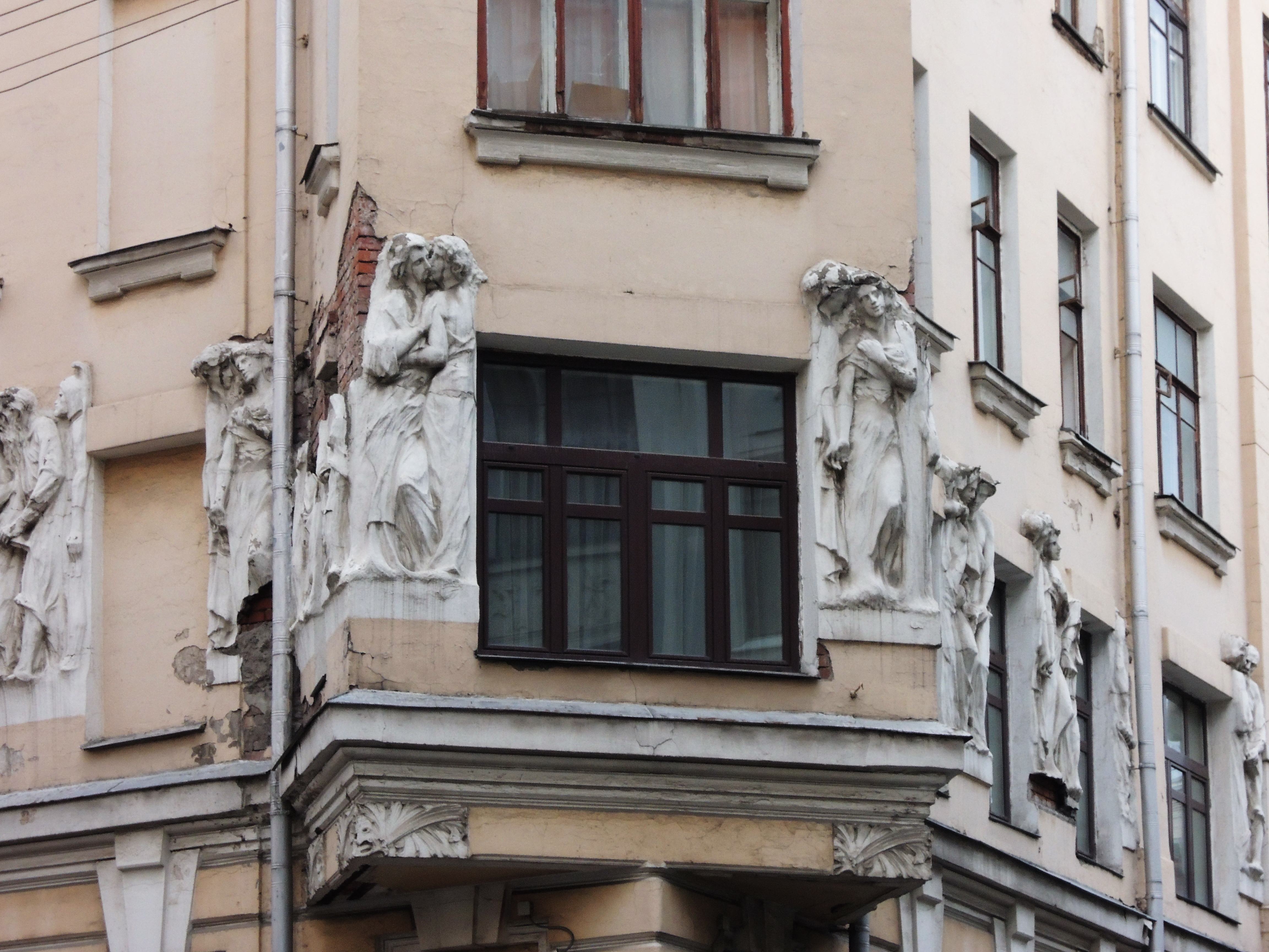 Broido's house (Plotnikov lane)